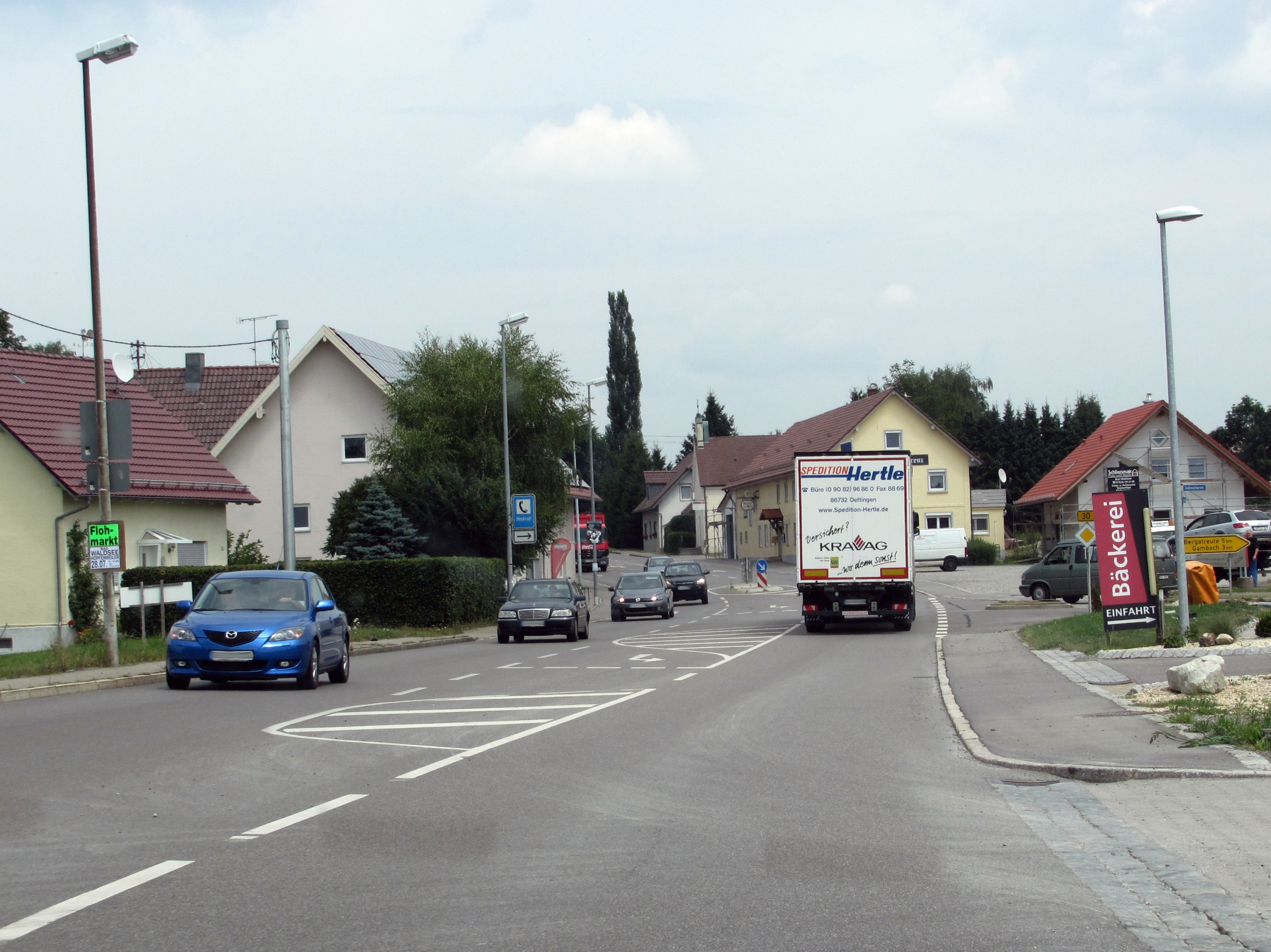 Bundesstraße 30. Ortsdurchfahrt Enzisreute. Fahrtrichtung Biberach.